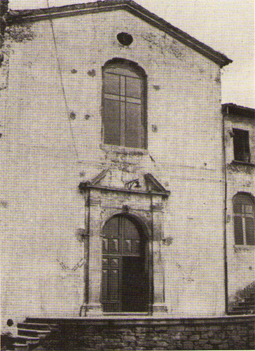 San Giovanni in Fiore - Chiesa di SAnta Maria della Sanità, foto anni '50